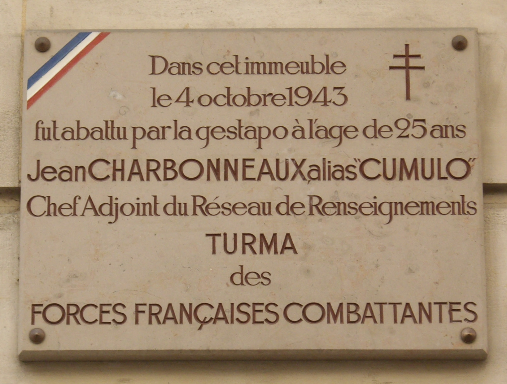 Plaque commémorative, 4 rue Francisque-Sarcey, Paris 16e. « Dans cet immeuble, le 4 octobre 1943, a été abattu par la Gestapo, à l'âge de 25 ans, Jean Charbonneaux, alias « Cumulo », chef adjoint du réseau de renseignements Turma des Forces françaises combattantes. »